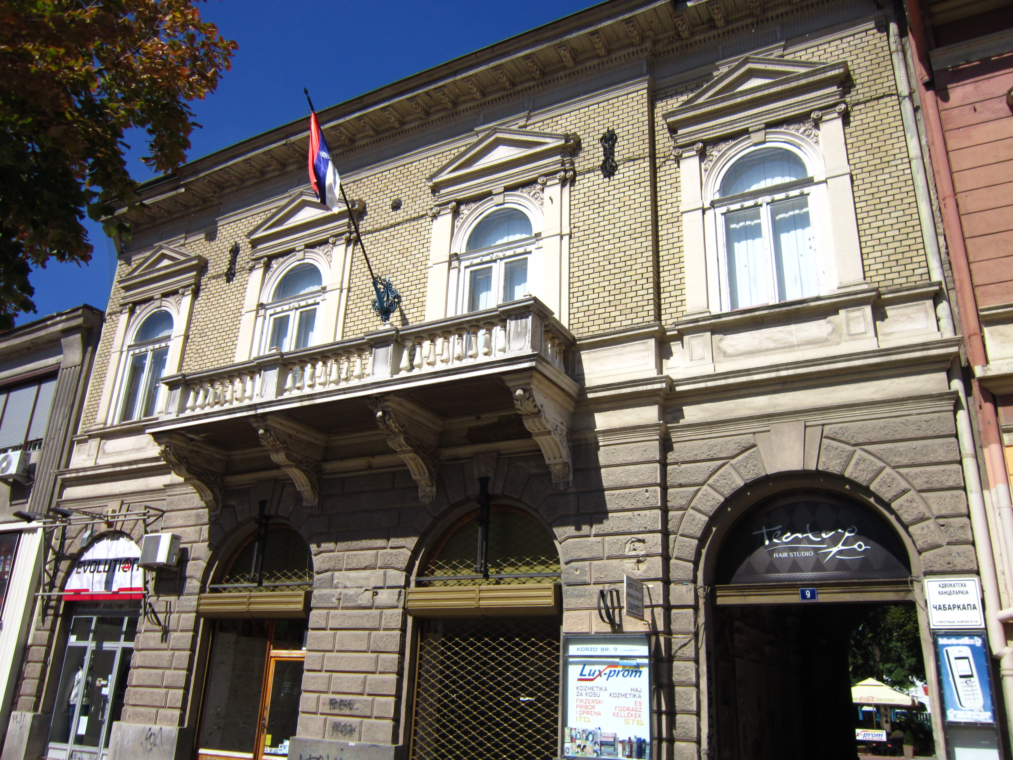 Зграда у Ул. Корзо бр. 9 , Суботица